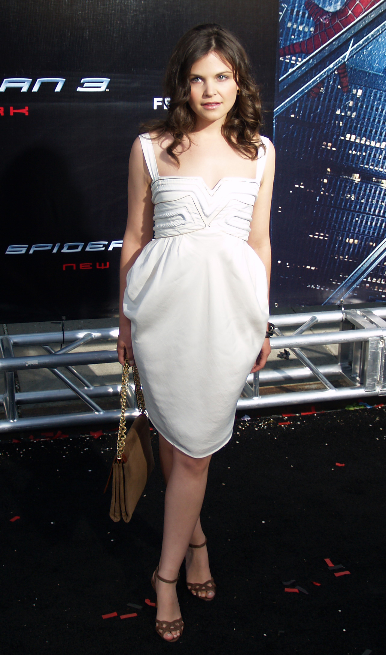 Ginnifer Goodwin